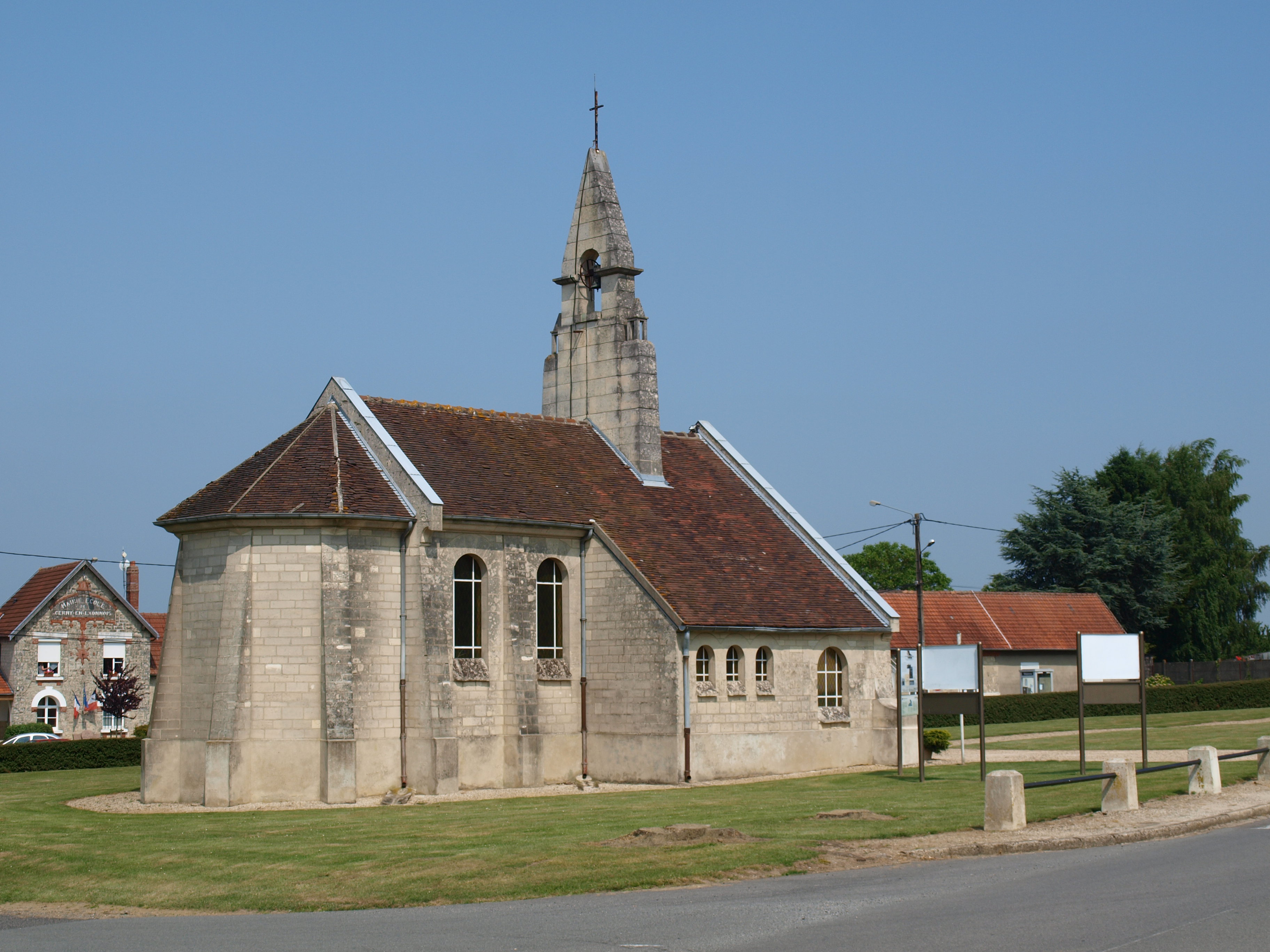 Cerny-en-Laonnois (Aisne, France) ; chapelle-mémorial